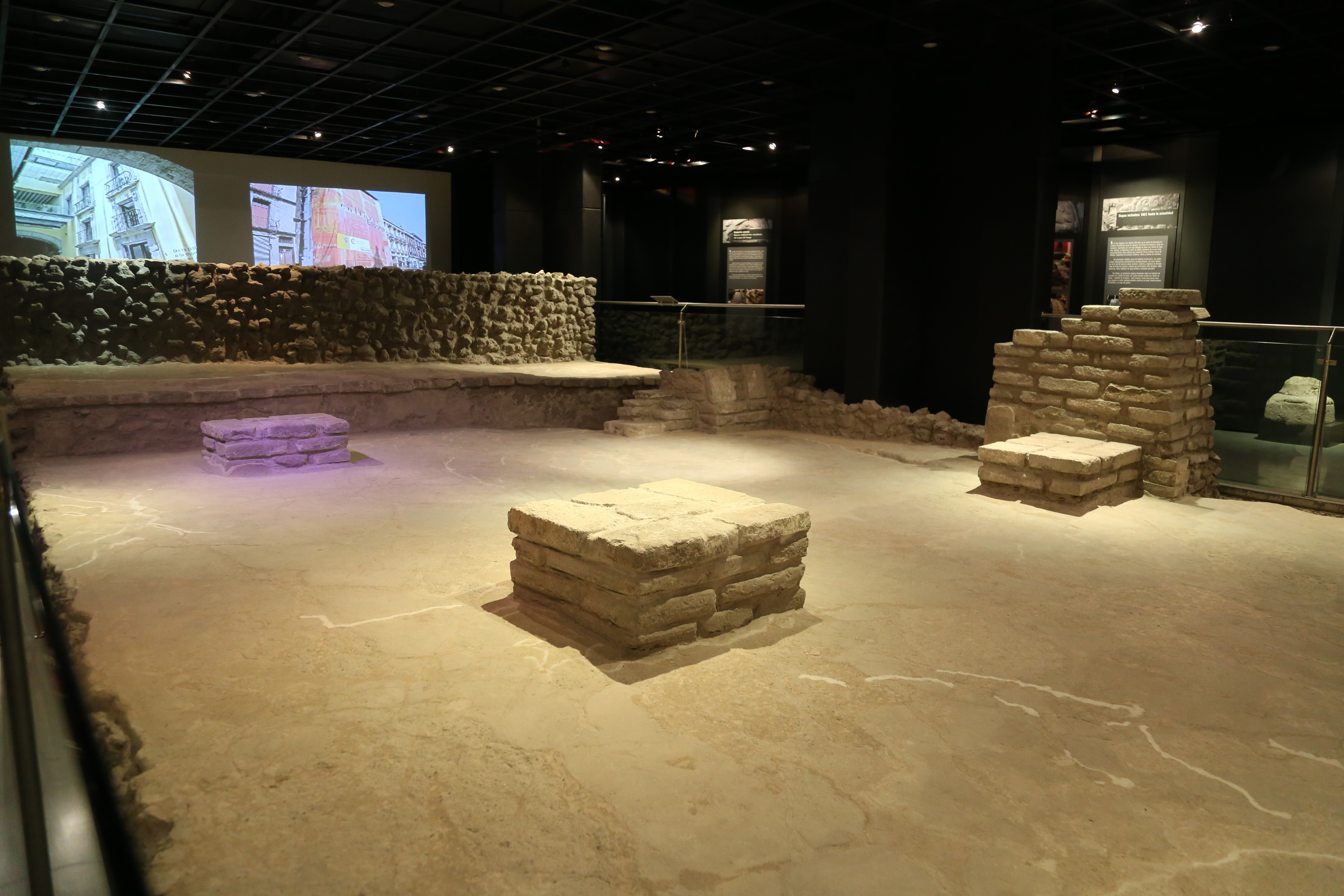 Vestigios de Tenochtitlan